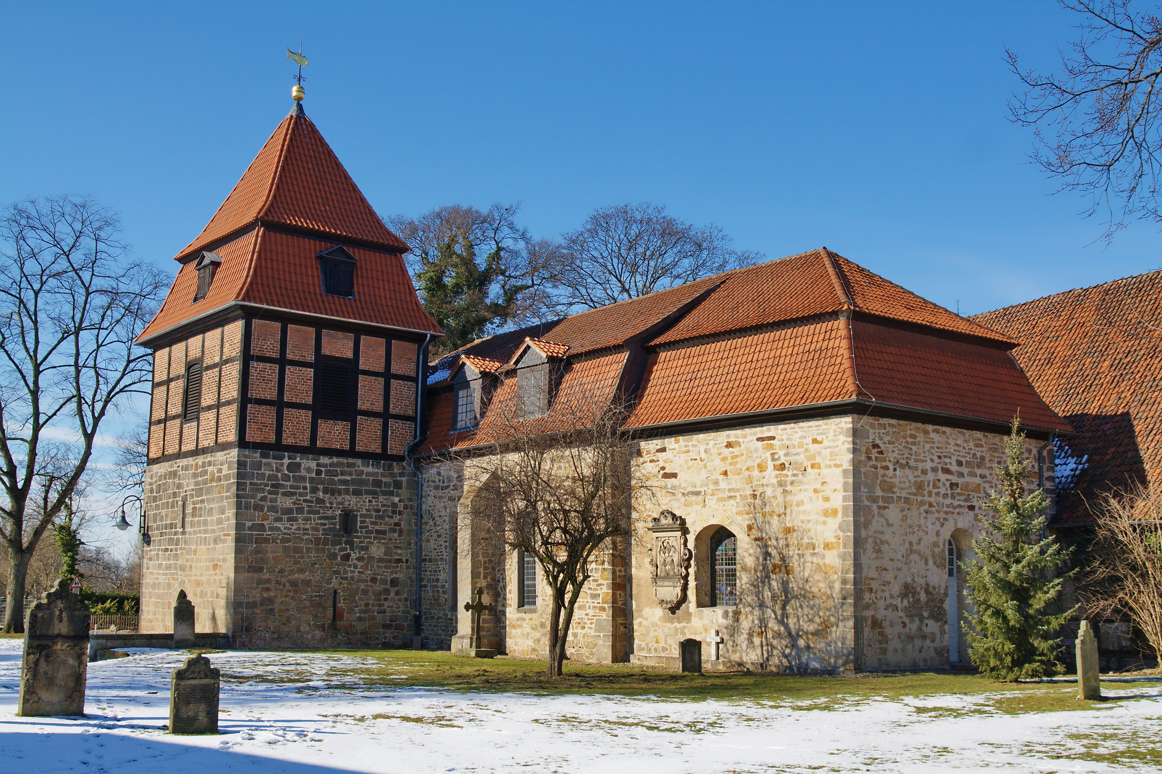 St. Vitus-Kirche in Wilkenburg (Hemmingen), Niedersachsen, Deutschland